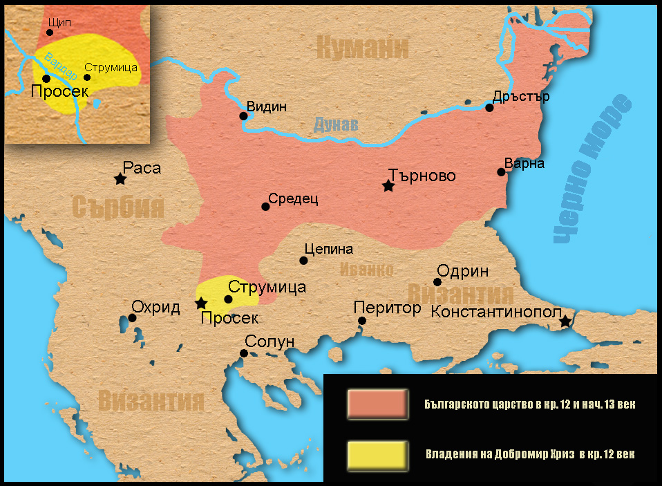 Владенията на Хриз и Балканите в кр. на 12 и нач. на 13 век.